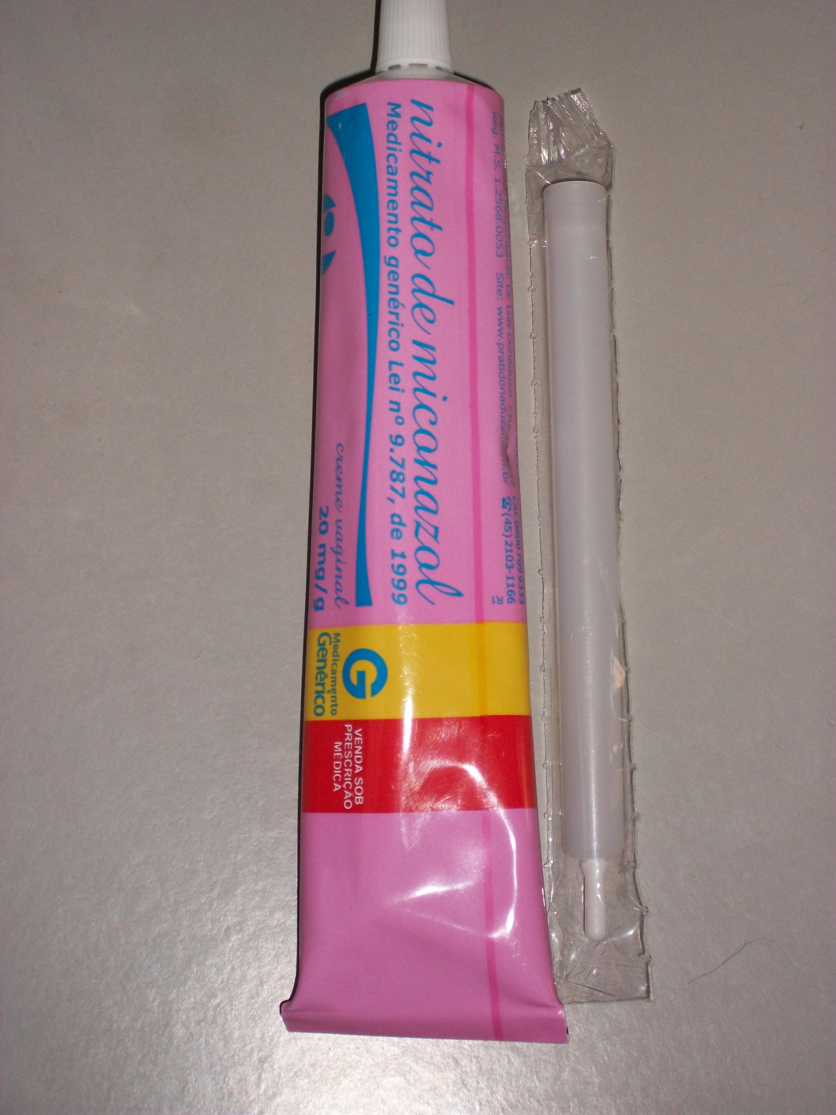 Nitrato de miconazol 20 mg/g, medicamento genérico do Brasil para uso vaginal.